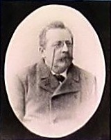 Josef Konárovský (1840-1899), rakouský lékař a politik